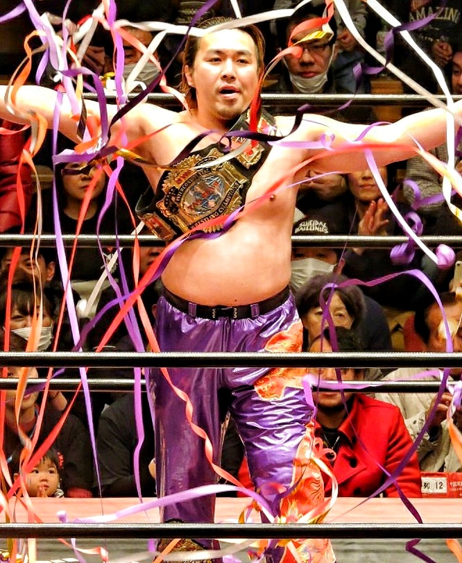 プロレスラーの菅原拓也